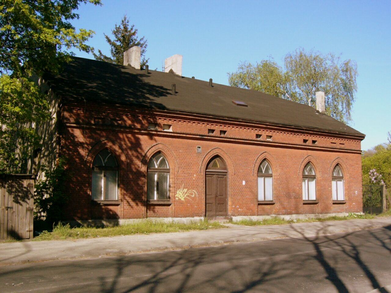 Parterowy budynek przy ul. Bednarskiej 23a w Łodzi